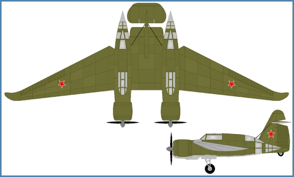 Bieljajev DBLK